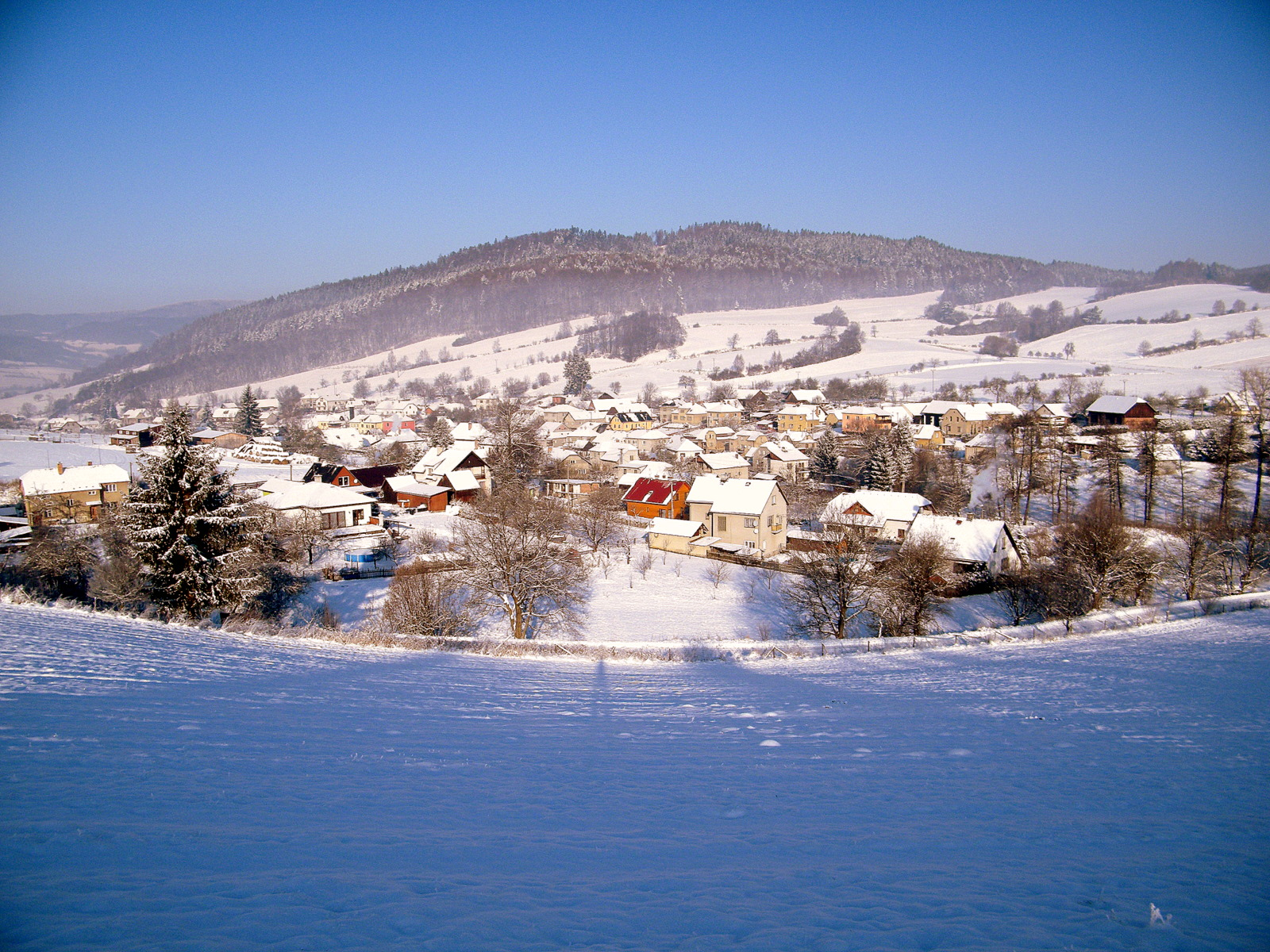 Autor: Josef Ptáček Datum: prosinec 2010